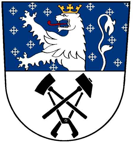 Coat of arms of Malstatt-Burbach in Burbach in Saarbrücken